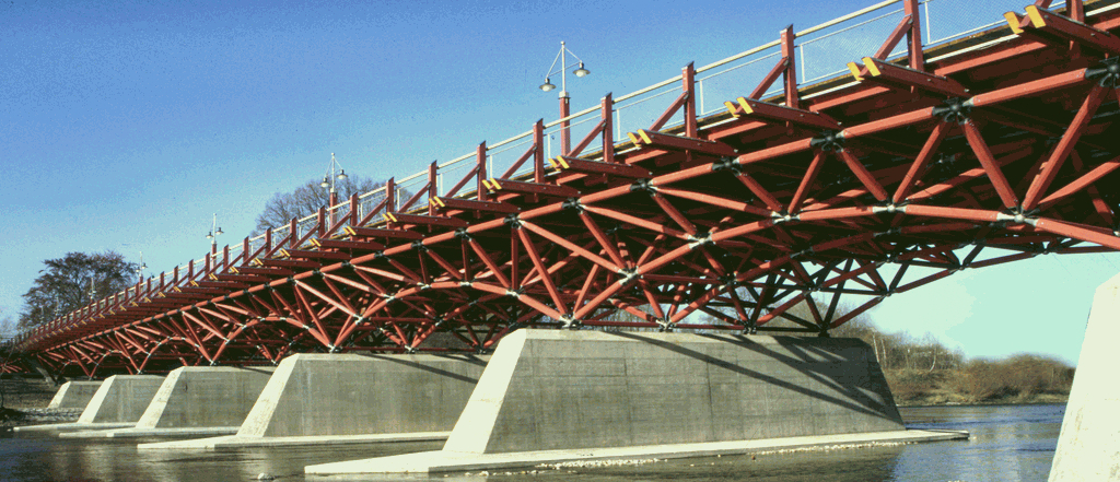 München – Thalkirchner Bruecke ueber die Isar